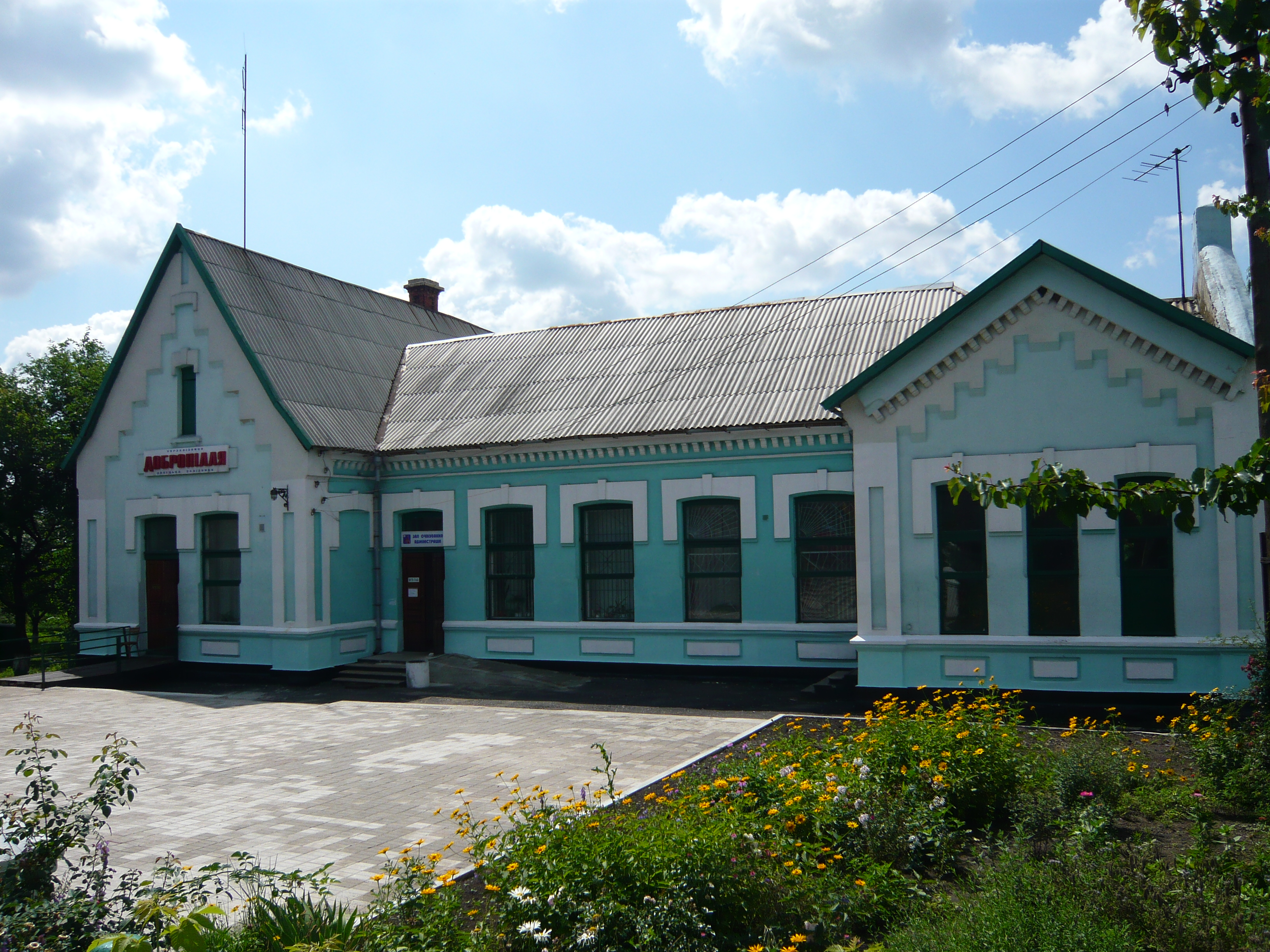 Станция Доброполье, Донецкая железная дорога